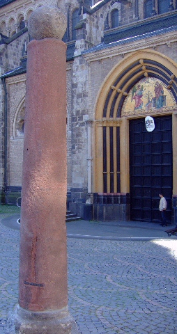 Pranger vor dem Hauptportal des Bonner Münsters. Im Hintergrund prangt über dem Portal das Wappen des Vatikans zur Kennzeichnung einer Basilica minor.